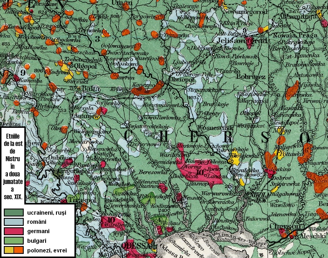 Harta etnică a regiunilor de la est de Nistru în a doua jumătate a secolului 19. Fragment din harta etnică a Rusiei europene.